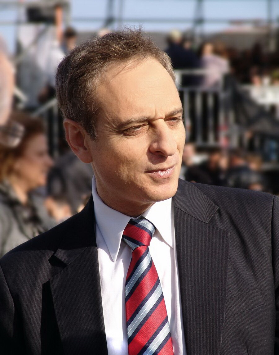 Eliezer Sandberg